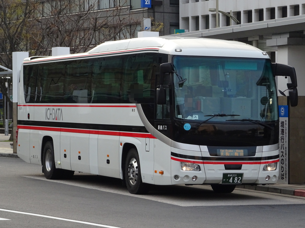 一畑バス8375号車 島根 200 か ･482